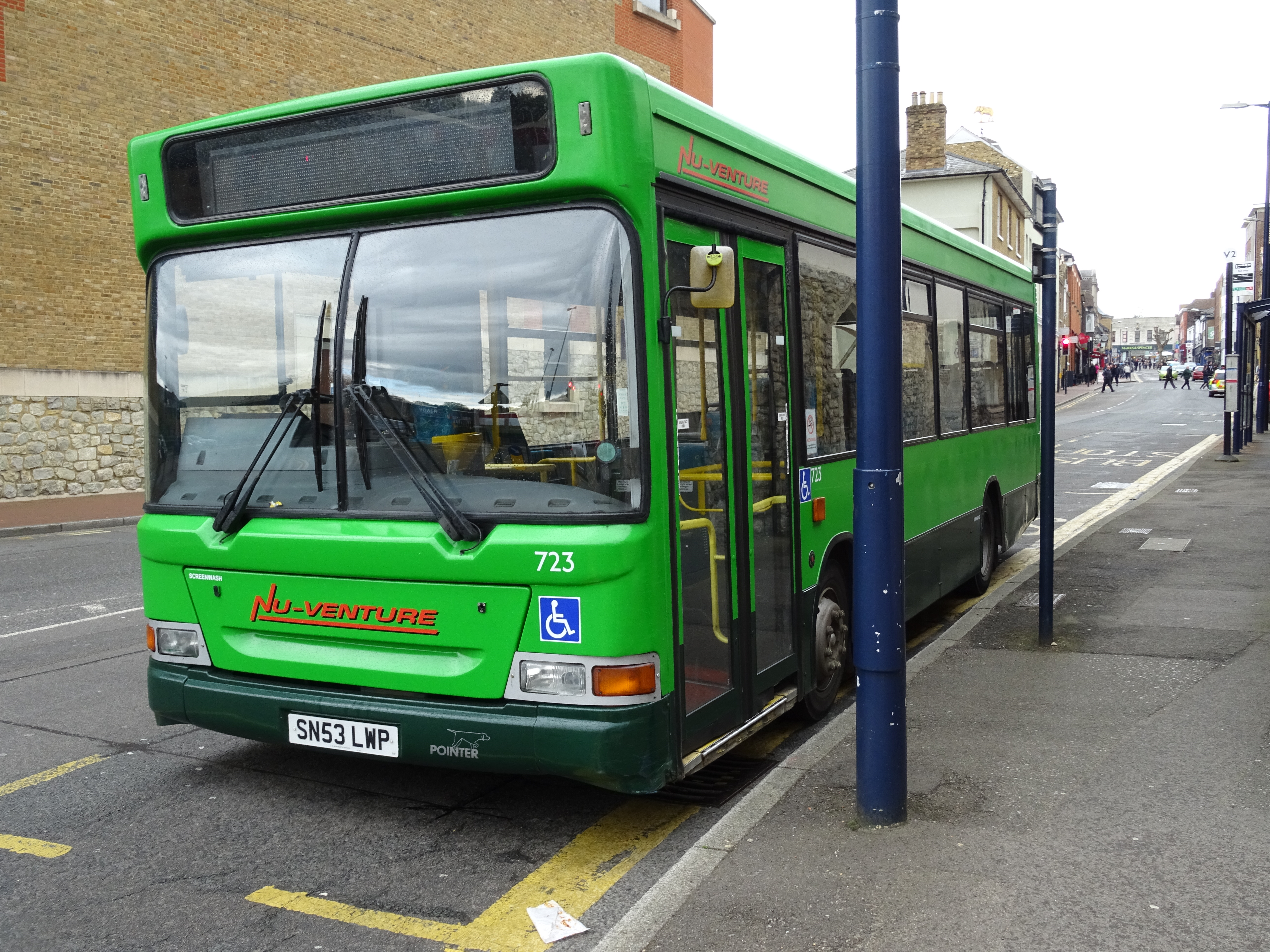 SN53LWP MAIDSTONE